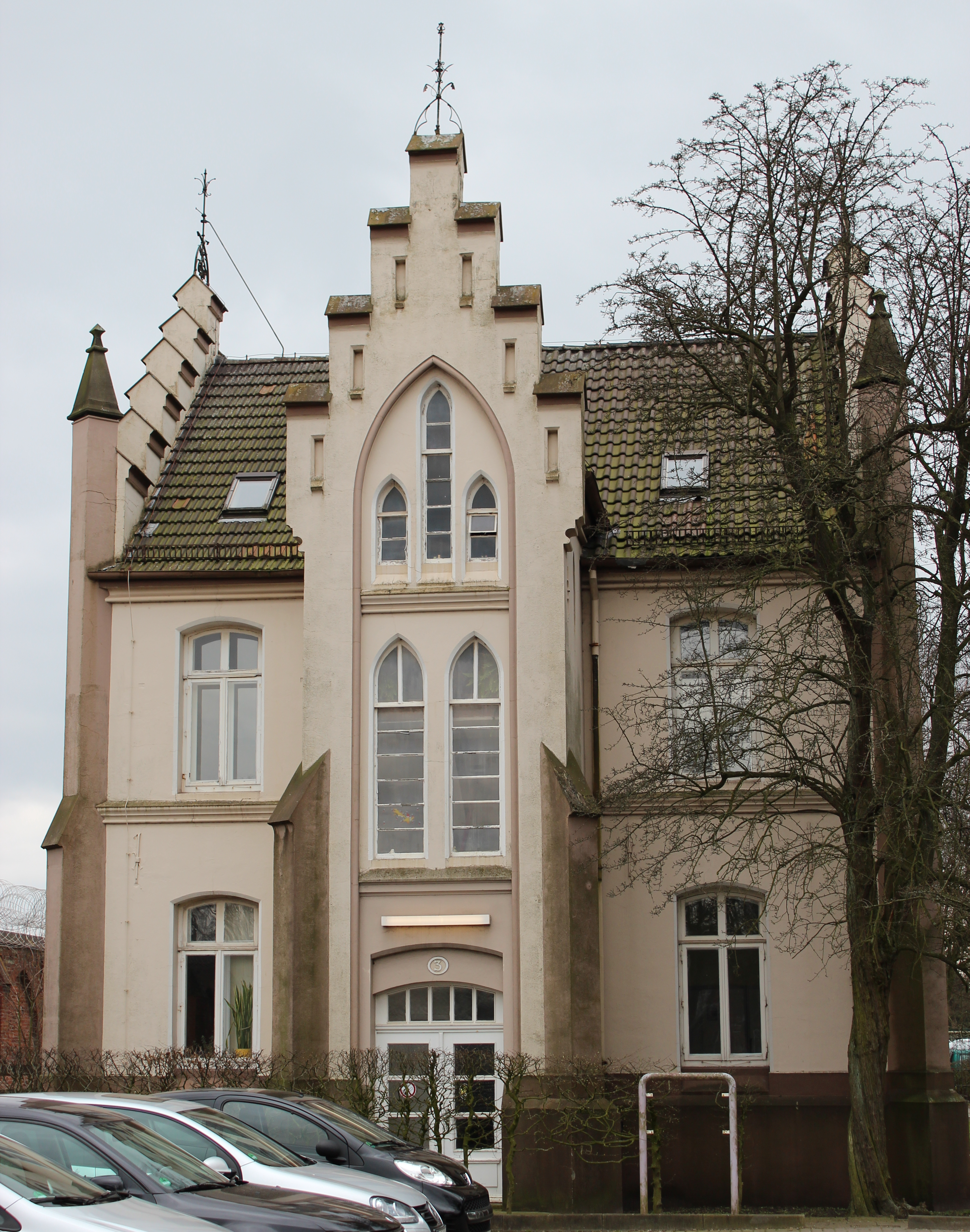 Strafanstalt Oslebshausen, Inspektoren- und Lehrerhaus, Justizvollzugsanstalt Oslebshausen in Bremen, Sonnemannstraße 3. Das abgebildete Objekt ist ein geschütztes Kulturdenkmal in der Freien Hansestadt Bremen, mit der Nr. 1347 beim Landesamt für Denkmalpflege registriert.